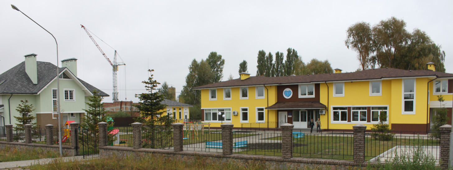 Фото з колекції ПБО "Надія і житло для дітей" в Україні